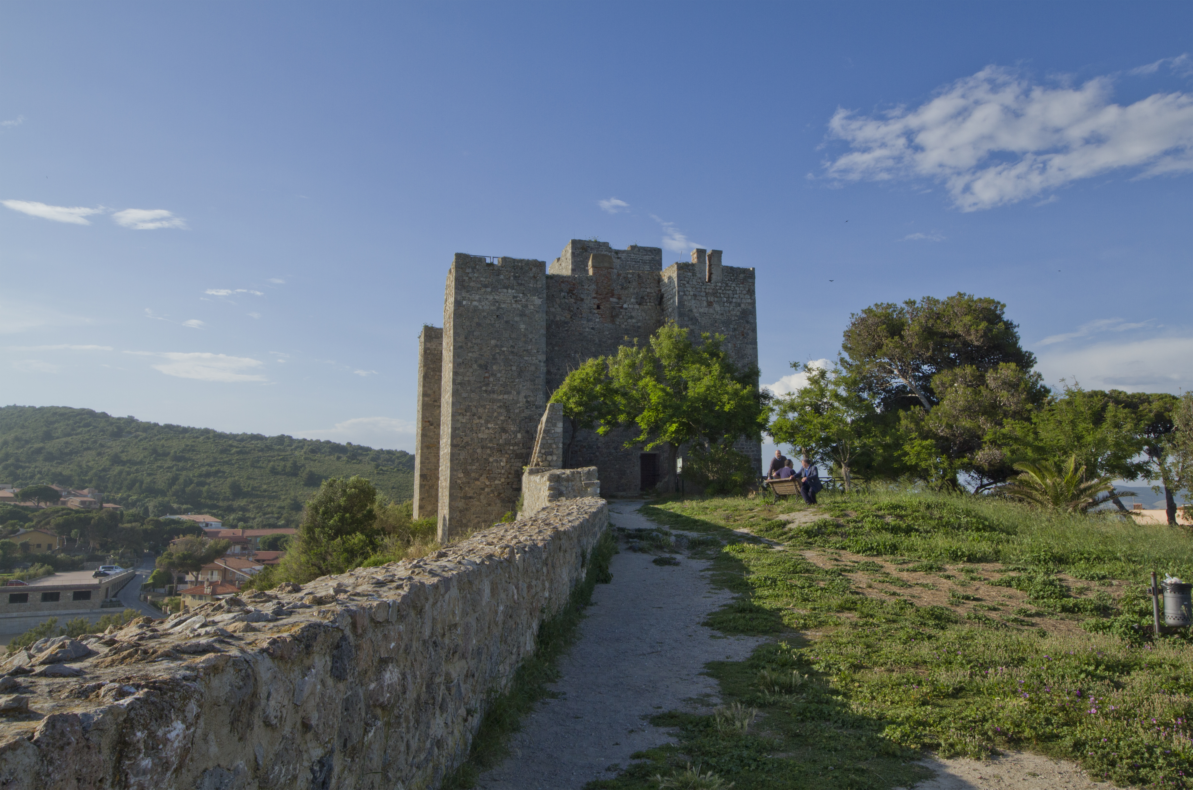 Rocca di Talamone, Talamone, Grosseto, Italy